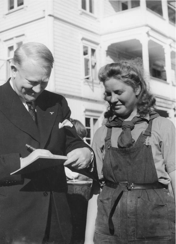 Vidkun Quisling, Autogramm schreibend 14401. Etwas befangen ist sie doch, diese norwegische Arbeitsmaid, wenn sie den Ministerpräsidenten Vidkun Quisling um ein Autogramm bittet. Aber sie möchte diesen Namen auf keinen Fall missen, wenn sie später ihr Erinnerungsalbum durchblättert, das sie an die schönen drei Monate des Freiwilligen Weiblichen Arbeitsdienstes erinnert. Abgebildete Personen: Quisling, Vidkun: Ministerpräsident, Diplomat, 1945 hingerichtet, Norwegen